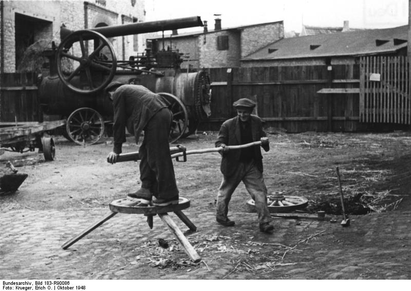 Osmartleben, Stellmacher-Arbeiten Illus/E. O. Krueger U.B.z.: Neubauern bei Stellmacher-Arbeiten. Osmartleben. 6.11.48 [Herausgabedatum] 2385-48